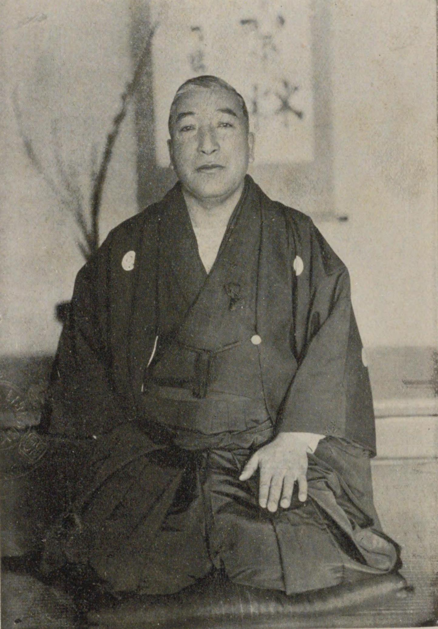 晩年の栗林五朔